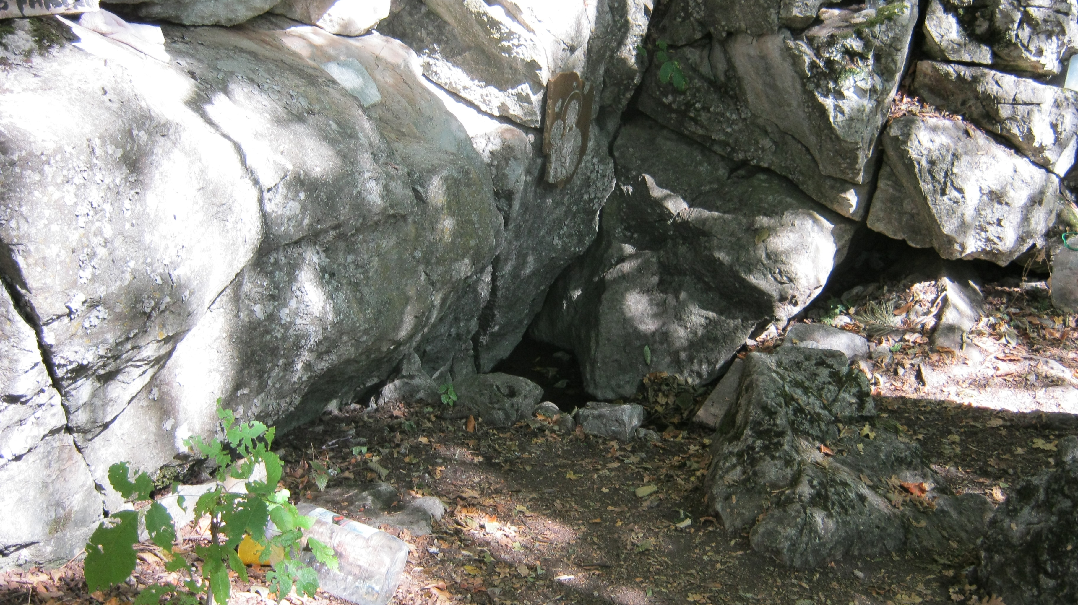 Српски (ћирилица): Извор говор вода на Гледићким планинама